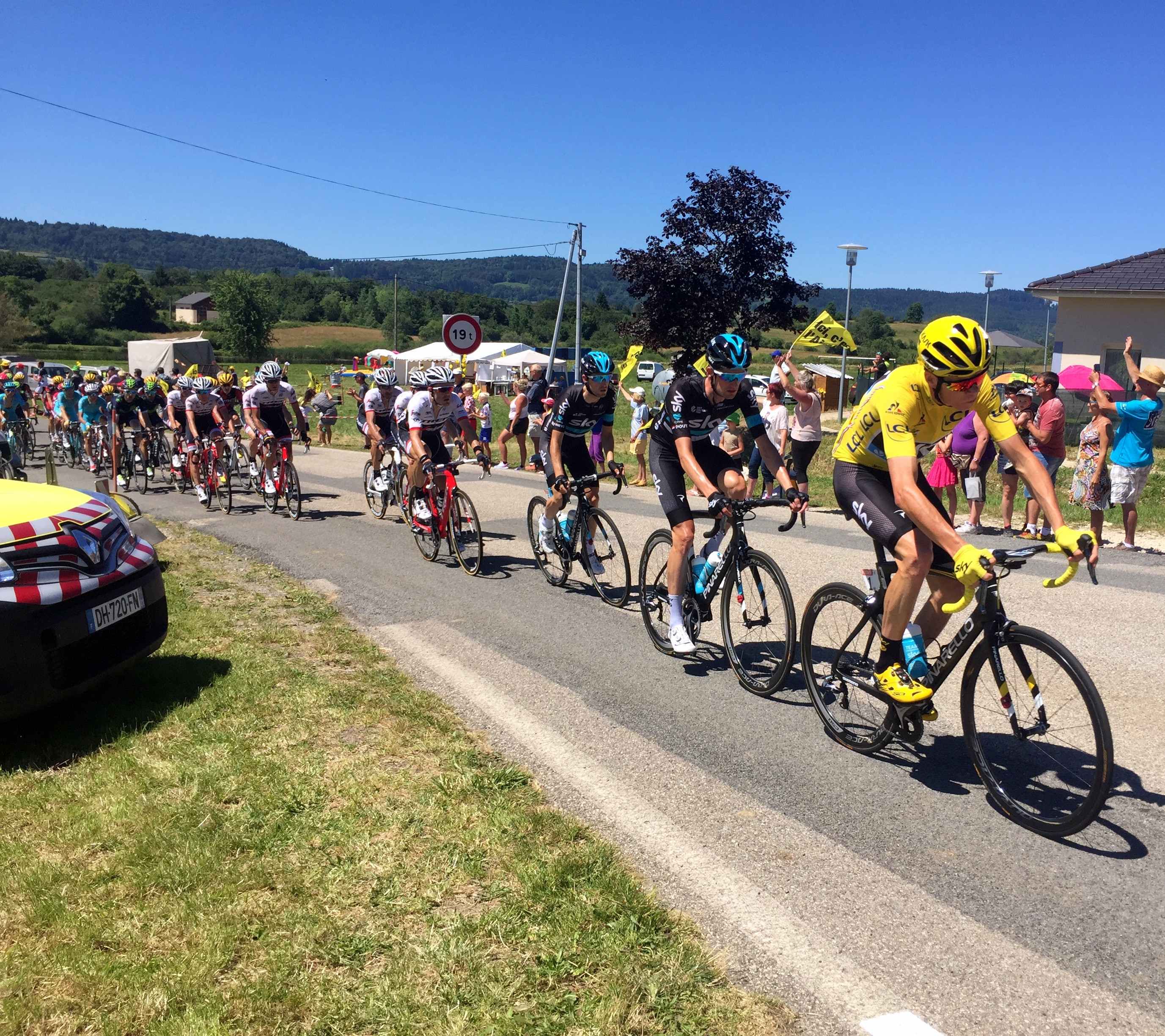 Tour de France 2016 à Champdor, Ain.